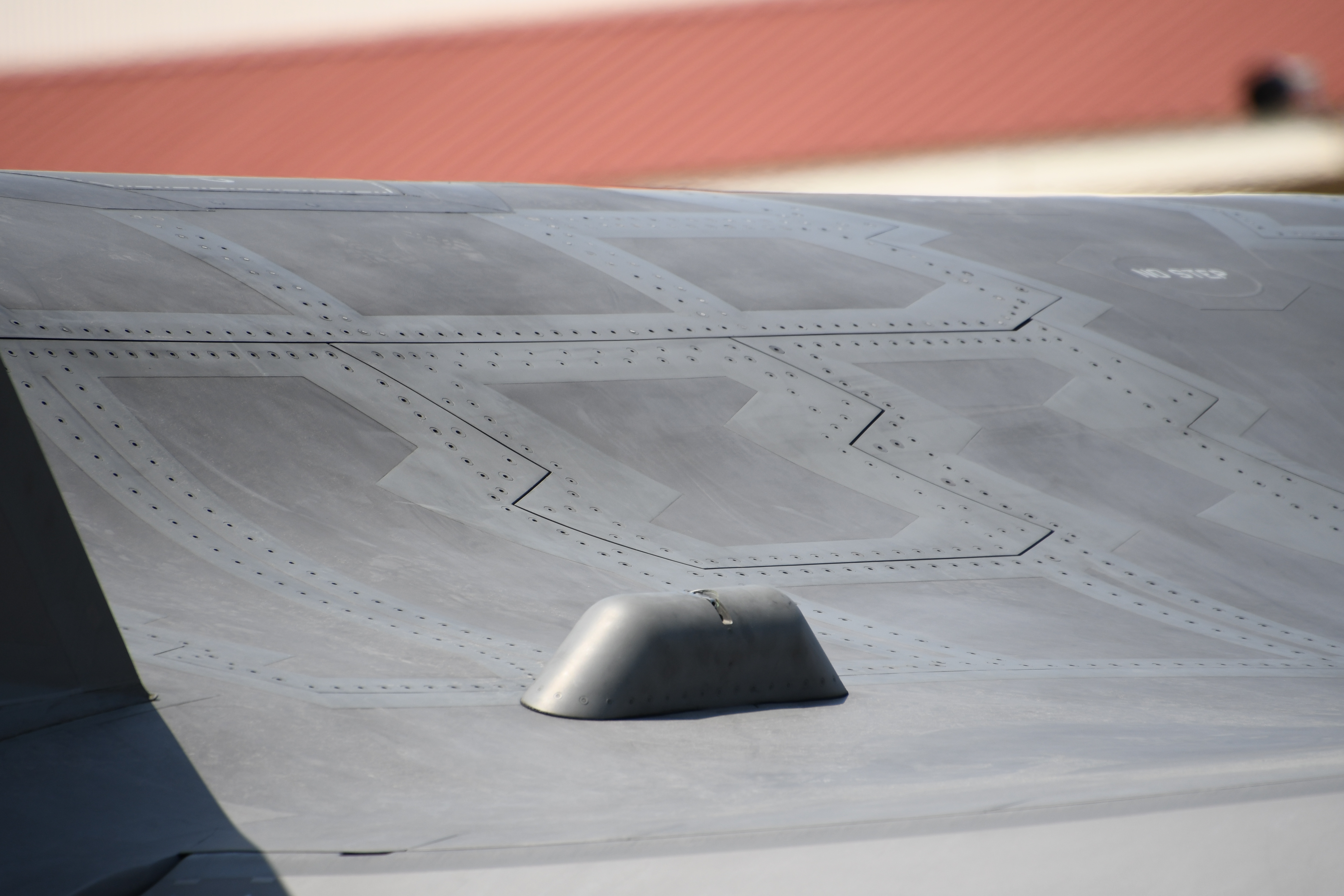 米海兵隊第121海兵戦闘攻撃飛行隊（VMFA-121） F-35BライトニングⅡ戦闘機（機体番号:169164） レーダー・リフレクター（機体上部右側）。2018年5月5日 米海兵隊岩国航空基地にて。